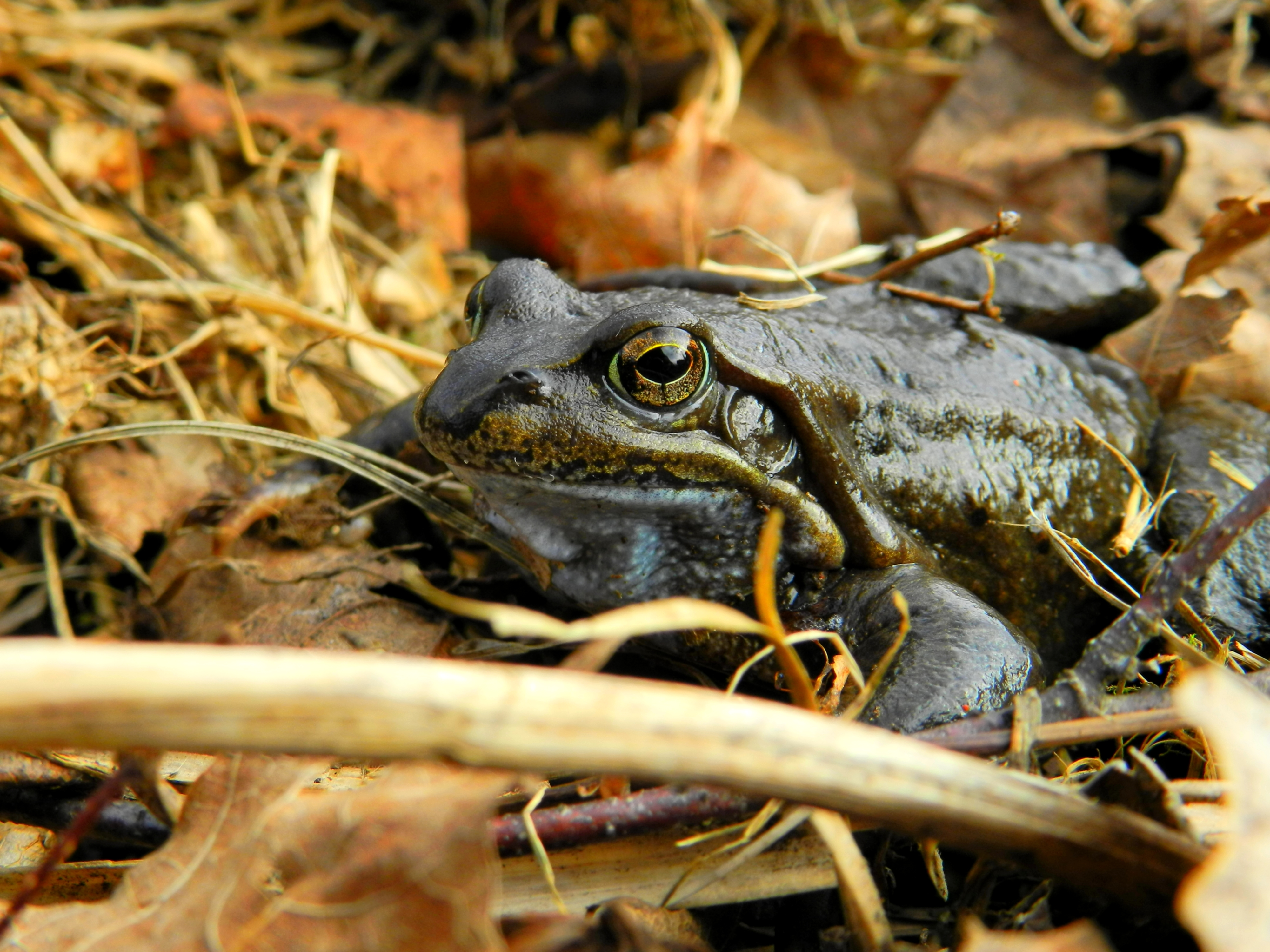 En åkergroda påväg till lekvattnet.